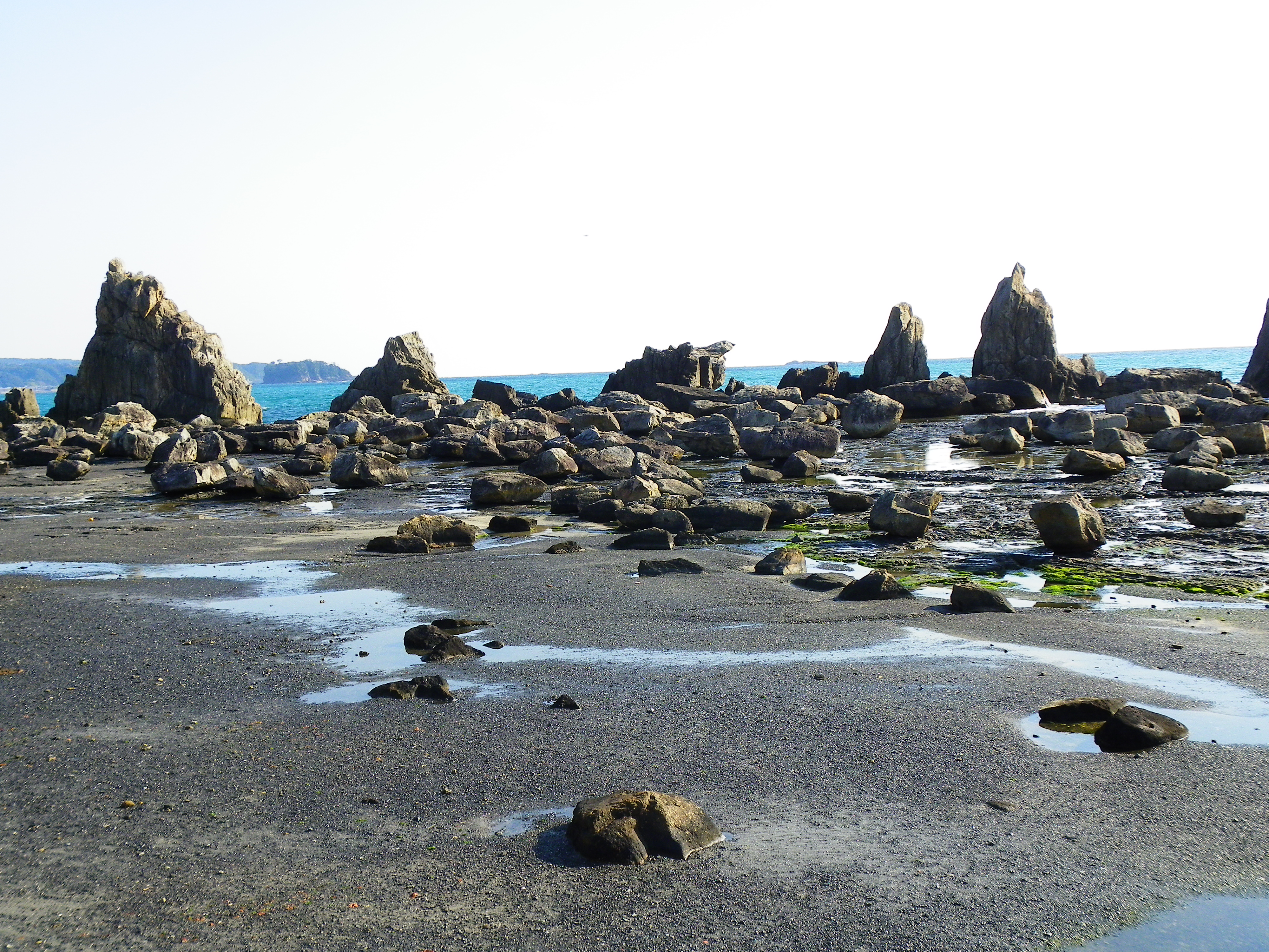 橋杭岩、左から：黒岩、タコ島、海老島、コボレ岩、折岩。